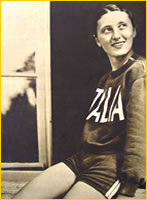 Fotografia di Ondina Valla